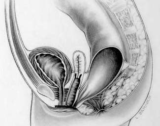 Rectovestibular fistula in females